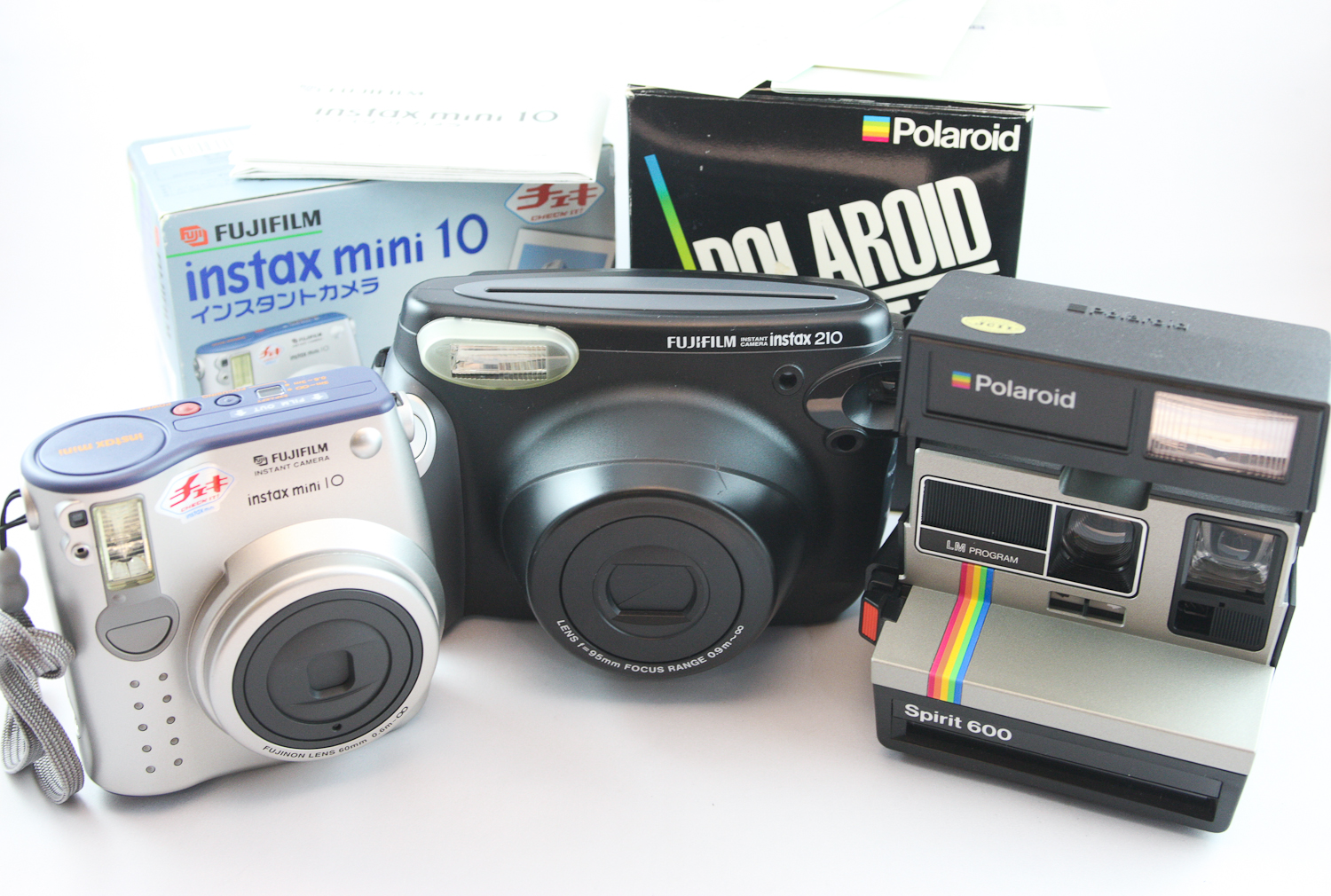 0464 Fuji Instax 210 Polaroid 600 Spirit Fuji Cheki